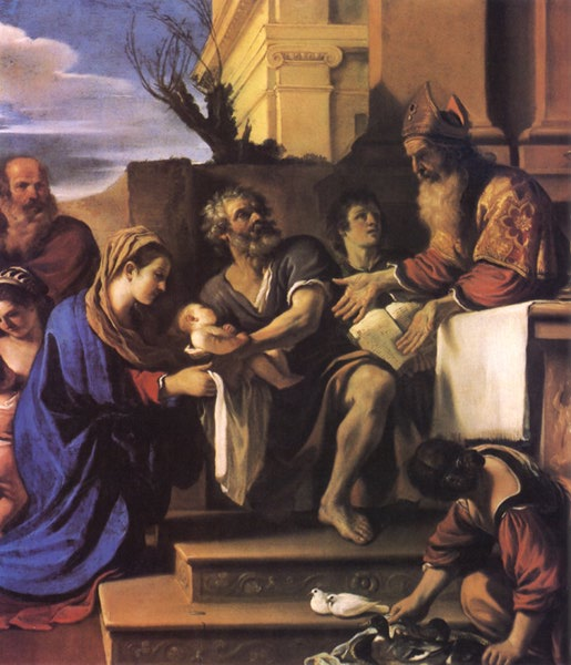 Presentazione di Gesù al Tempio, ol/rame, 72,5 x 65 cm, London, sir Denis Mahon Collection